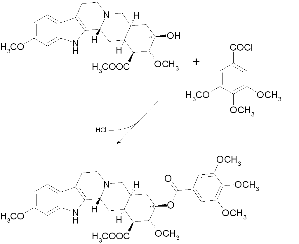 Letzter Schritt der Reserpin-Totalsynthese nach Woodward: Veresterung zu (±)-Reserpin.